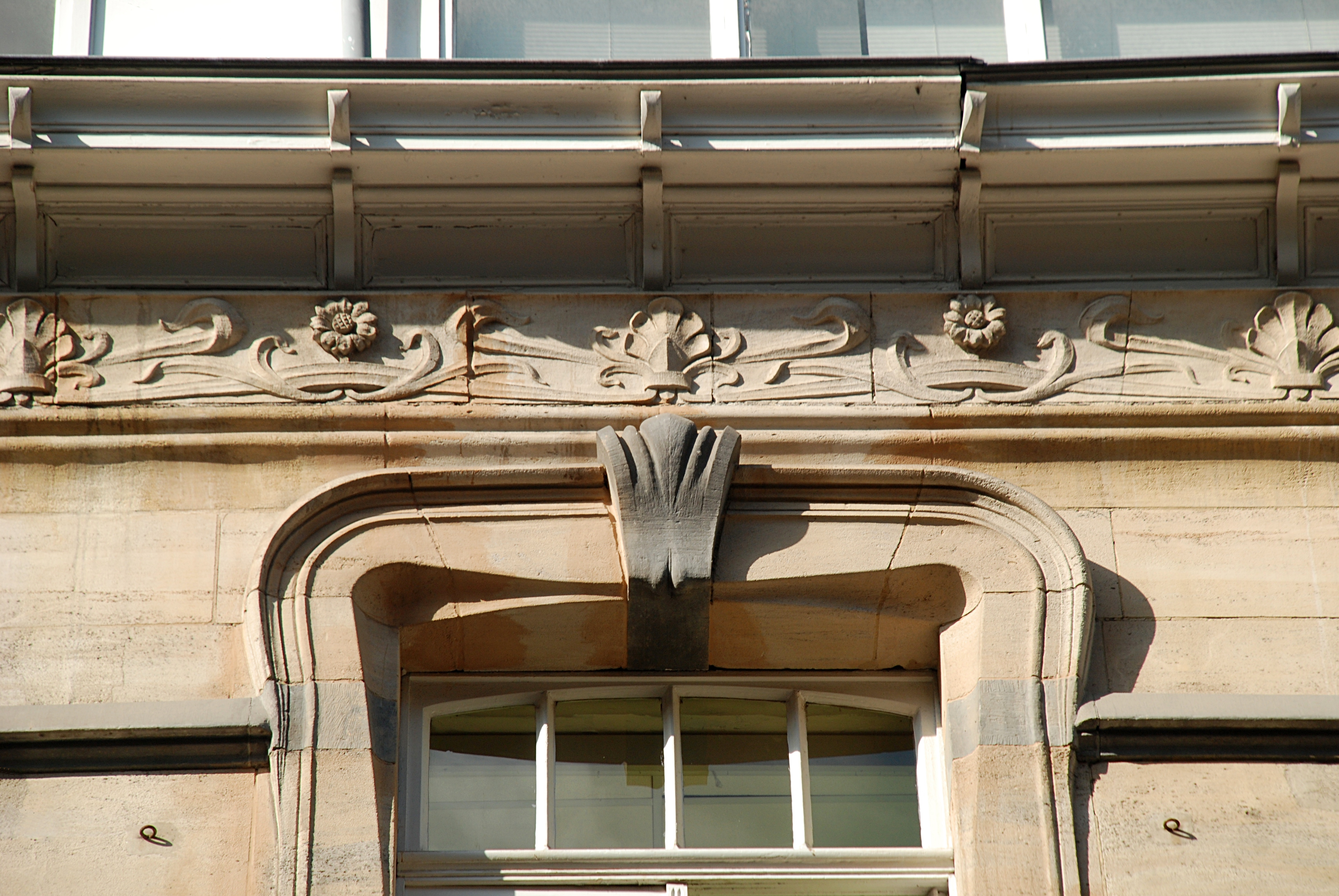 Grandes Galeries Belges, Bruxelles, architecte Dominique Fastré